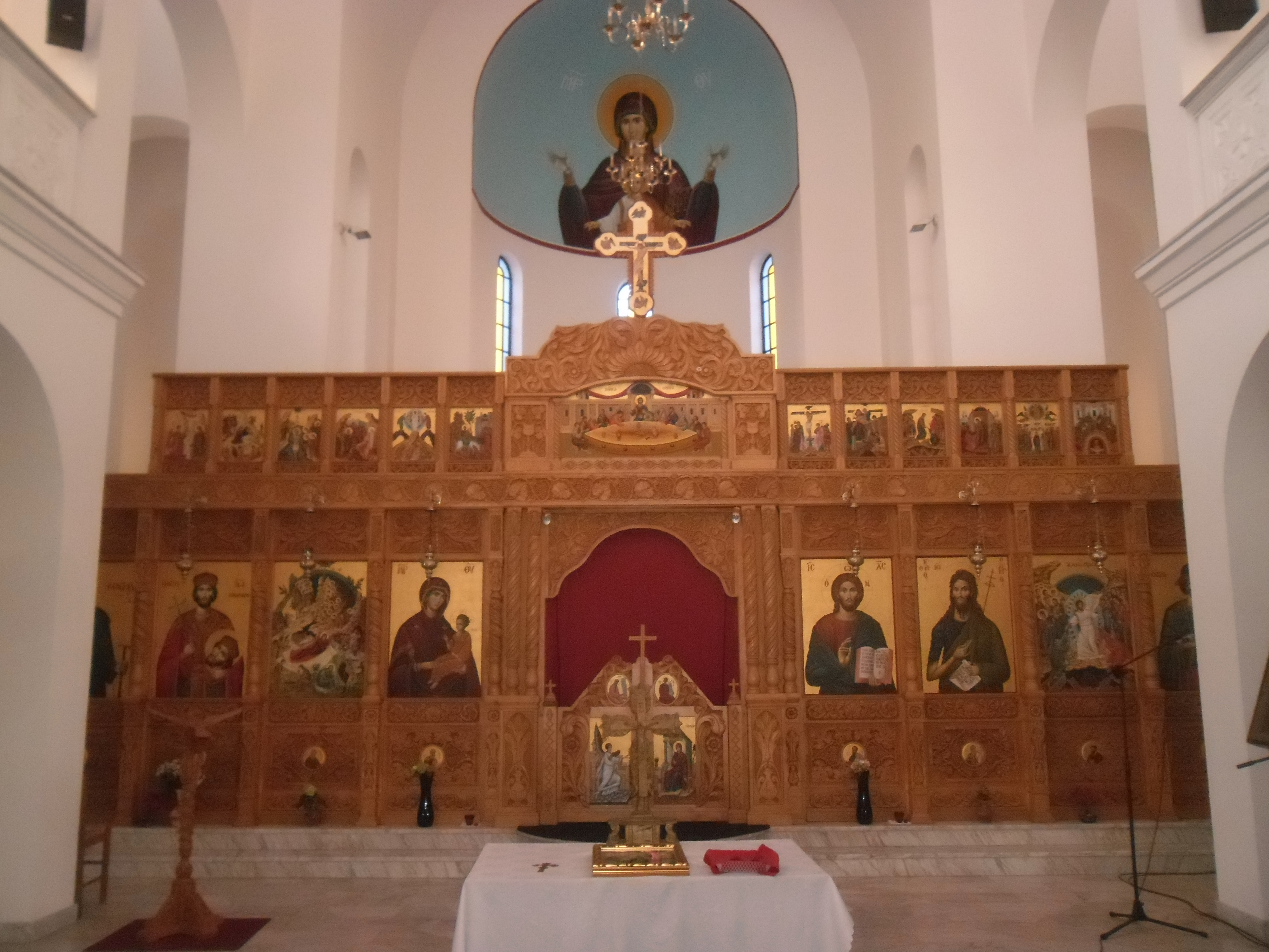 Shkodër